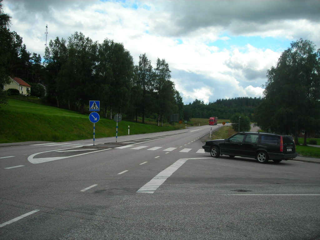 Road 172 at Färgelanda in Sweden